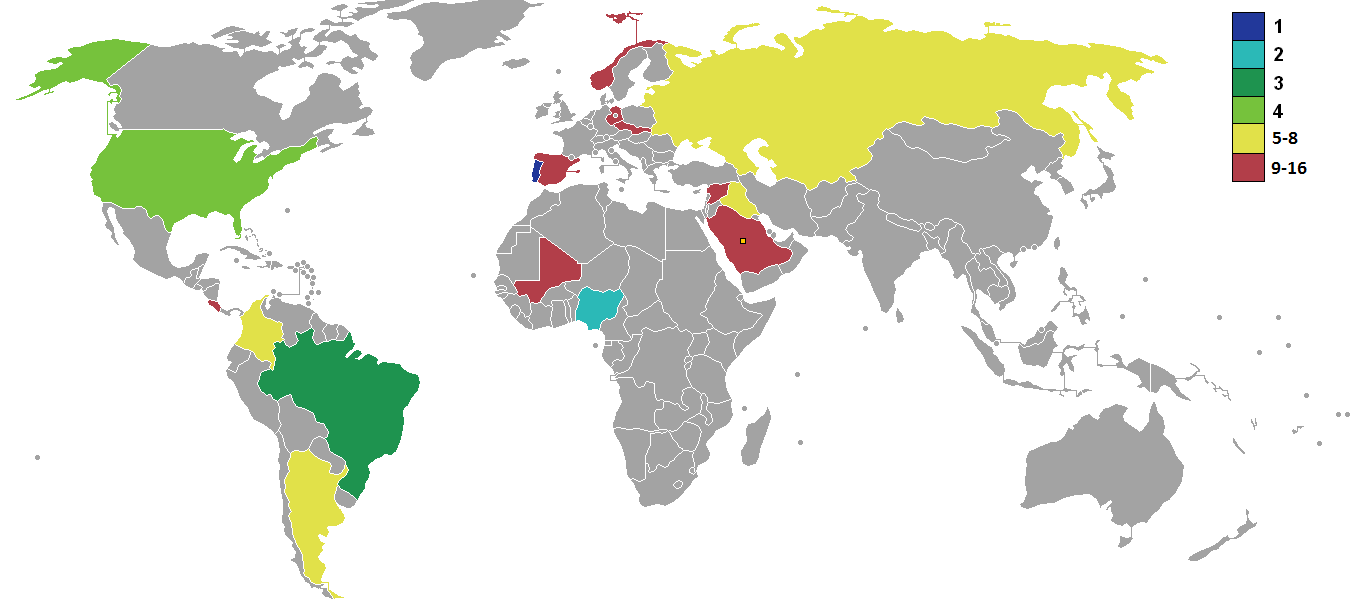 Mapa de los resultados del torneo.